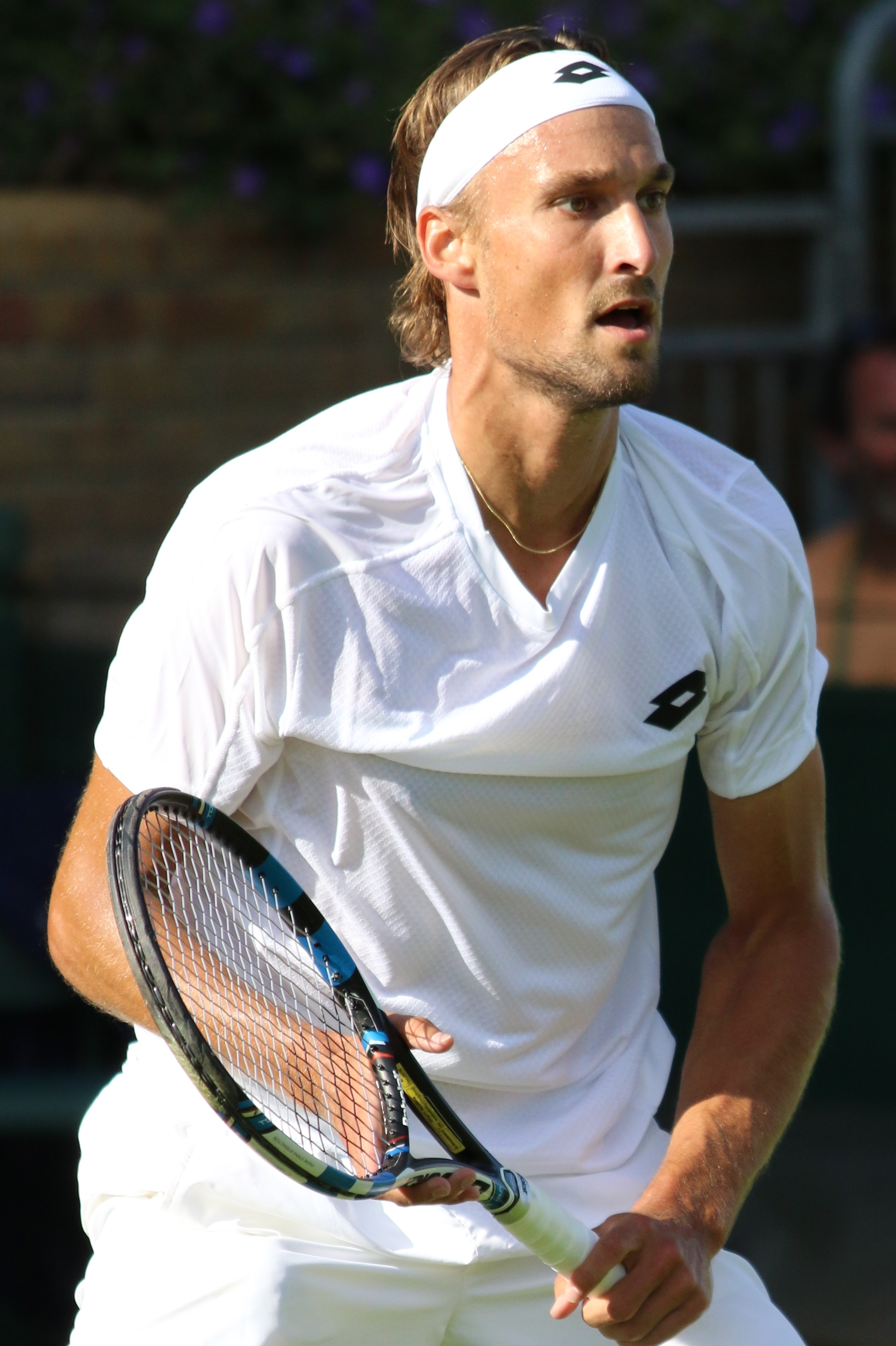 Bemelmans WM17 (7)